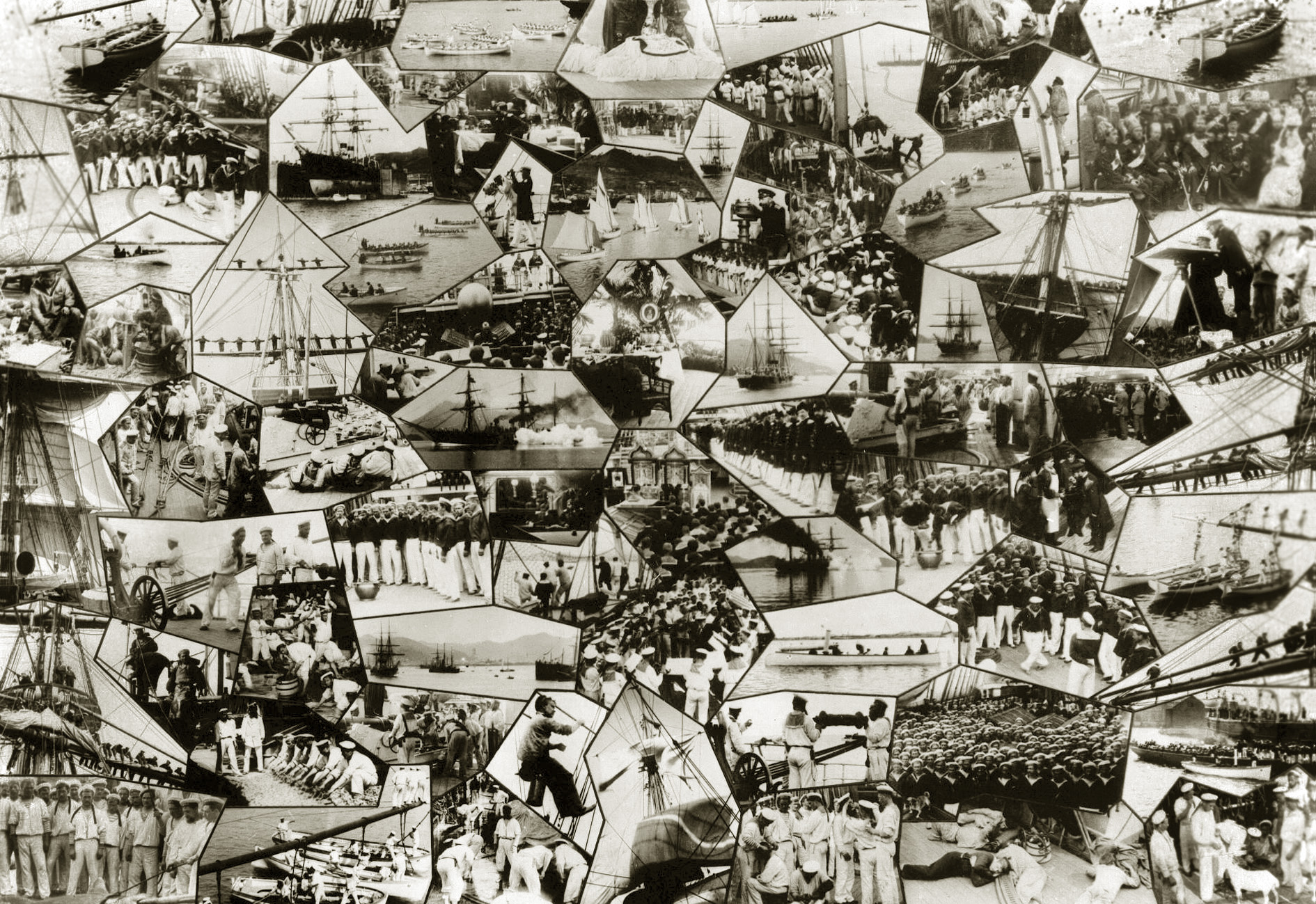 Коллаж из фотографий Константина Шульца сделанный во время плавания на корвете "Витязь" под командованием С. О. Макарова